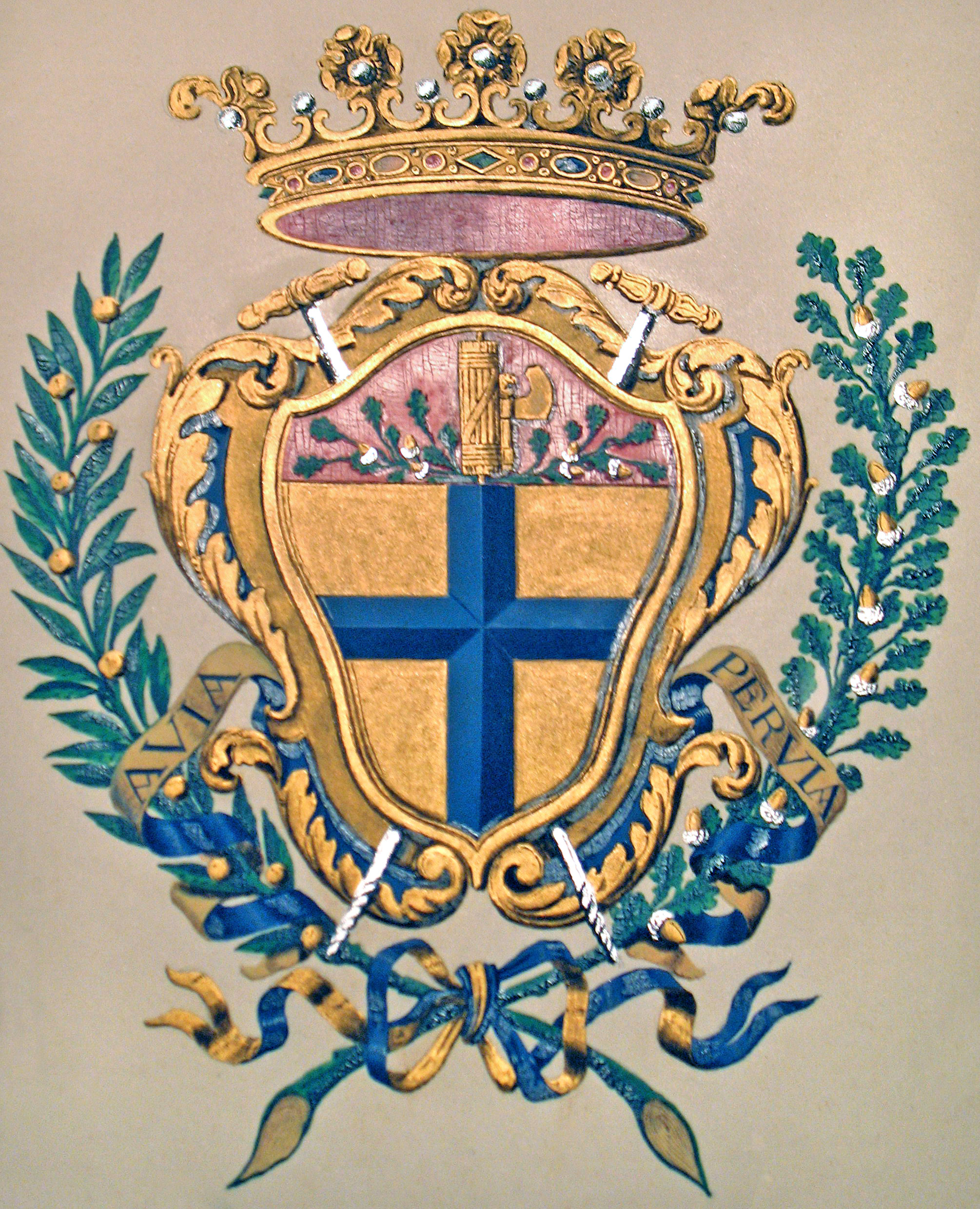 Bozzetto dello stemma ufficiale contenuto nel decreto di approvazione del 27 novembre 1934.